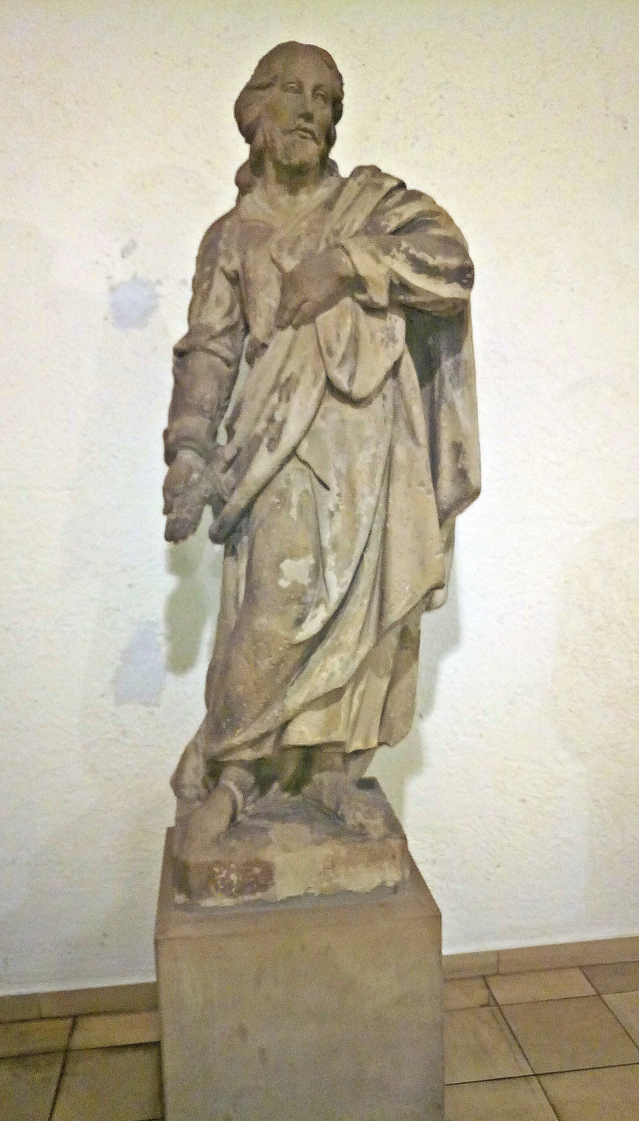 St. Joseph von Johann Matthäus van den Branden, 1779, Vorraum St. Ludwigskirche, Frankenthal